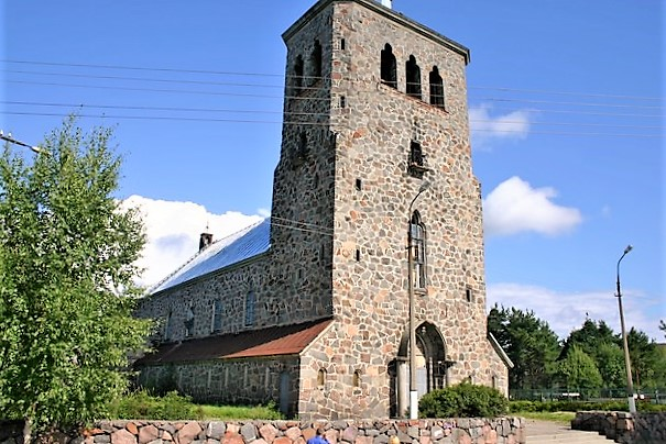 Кирха в Приозерске